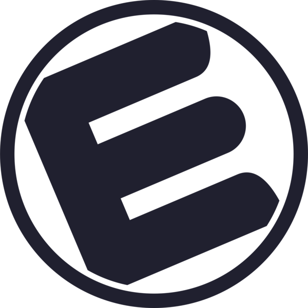 Eclot logo